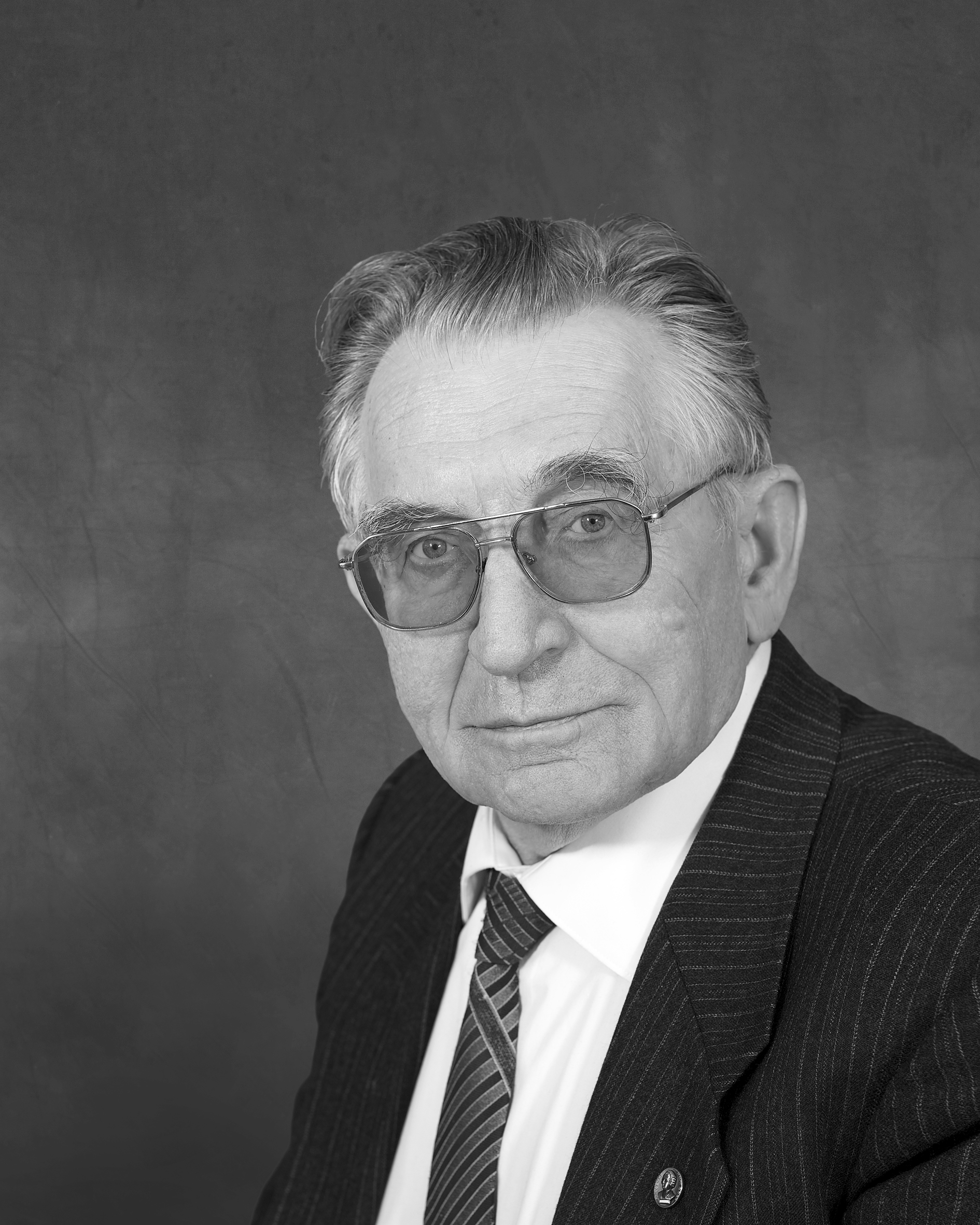 системный программист и математик, заслуженный профессор Московского университета